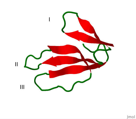 Imatge on es veuen els tres bucles de la carditoxina III